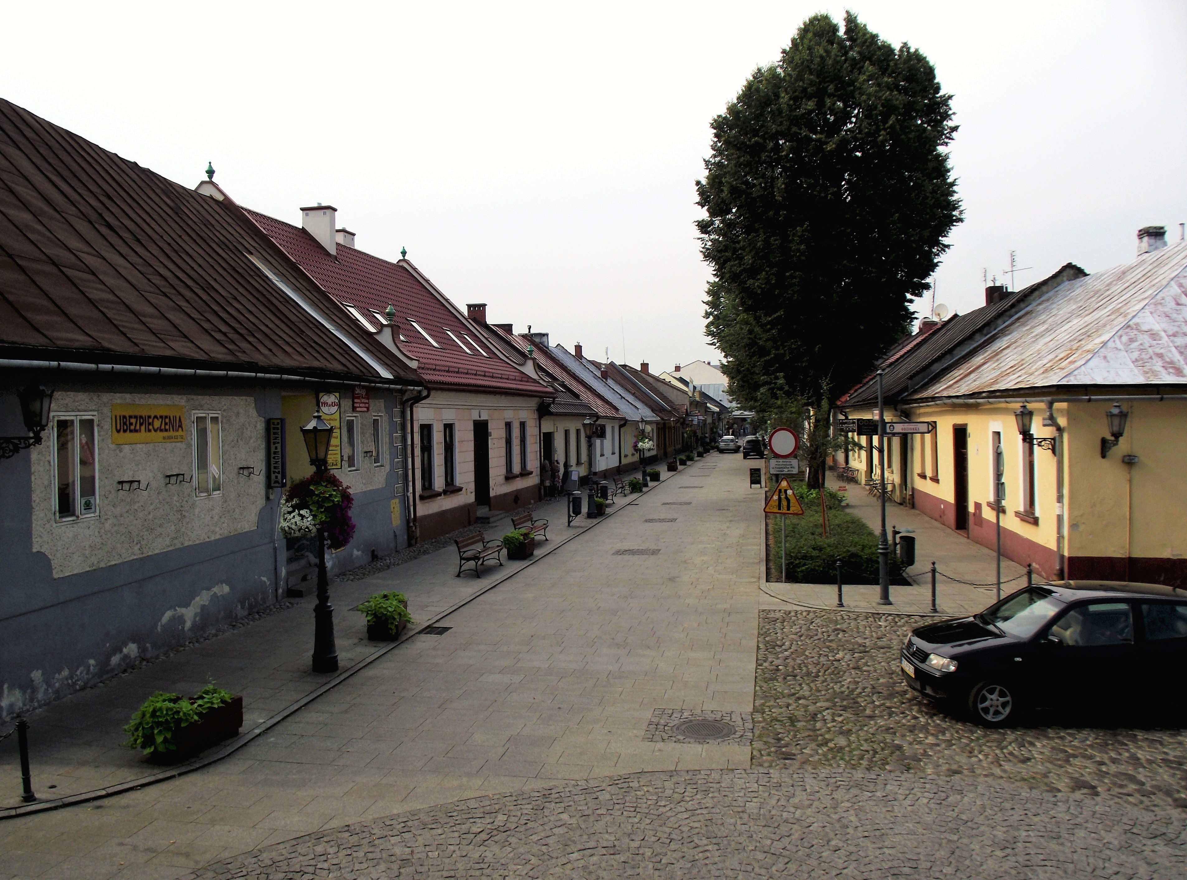 Stary Sącz, ulica Kazimierza Wielkiego.